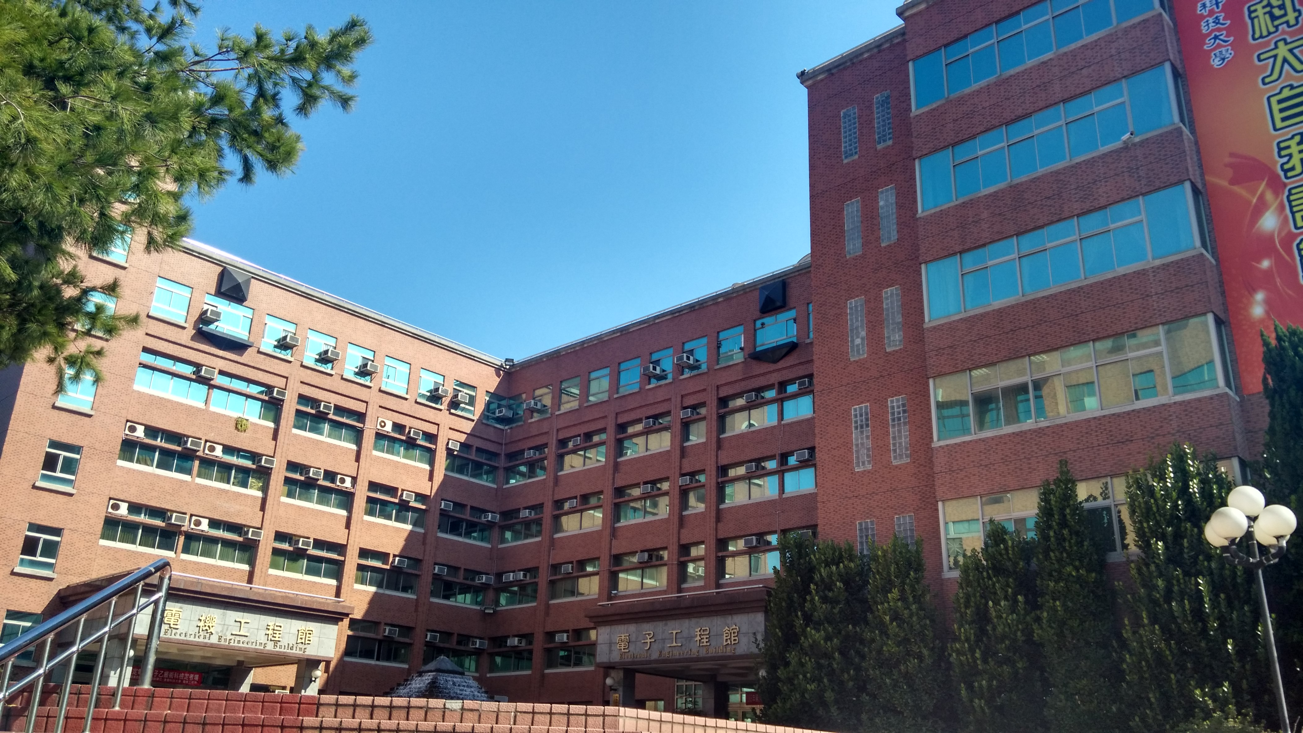 中文（台灣）: 建國科大工學院